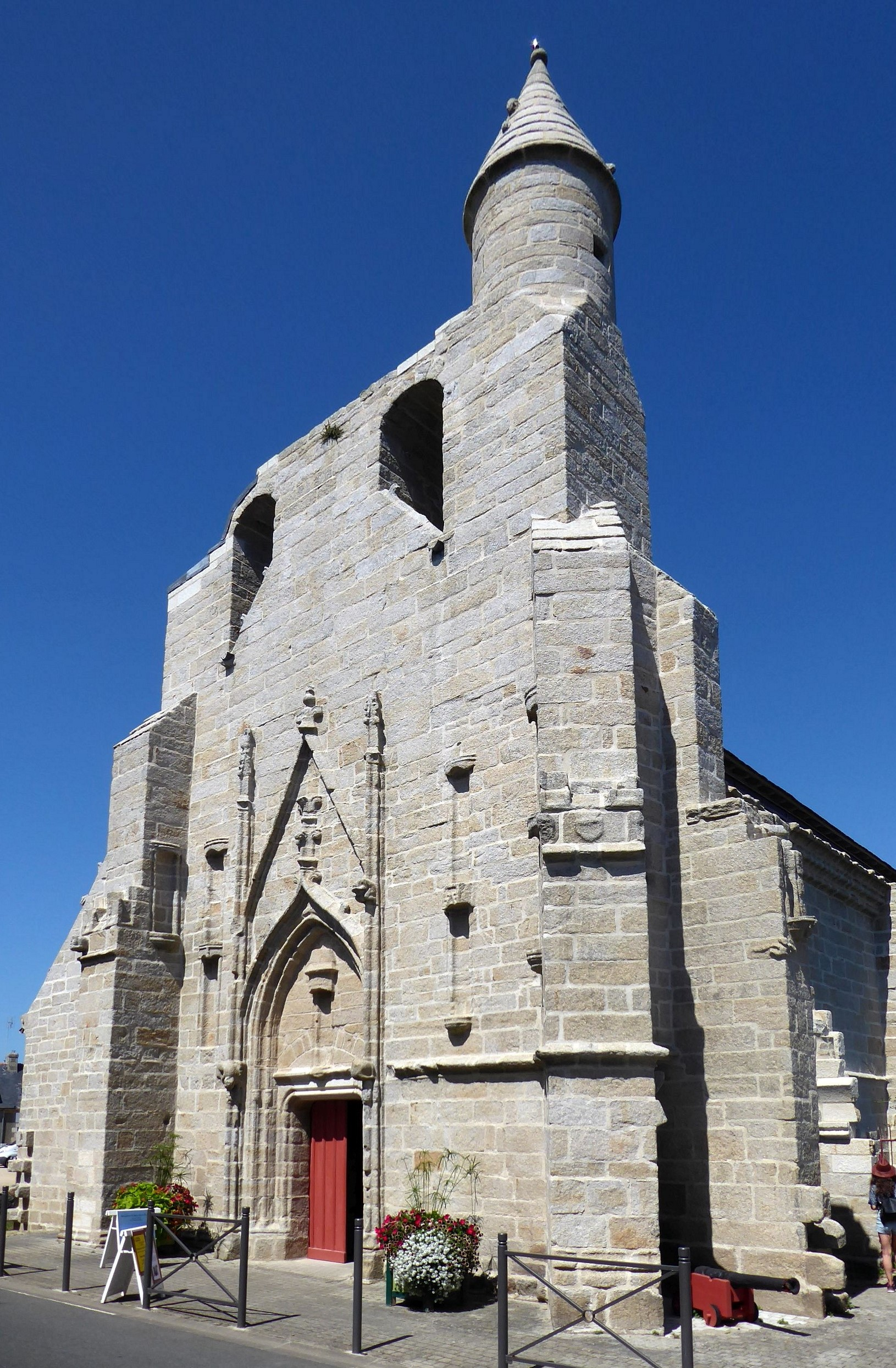 Église Sainte-Thumette de Kérity